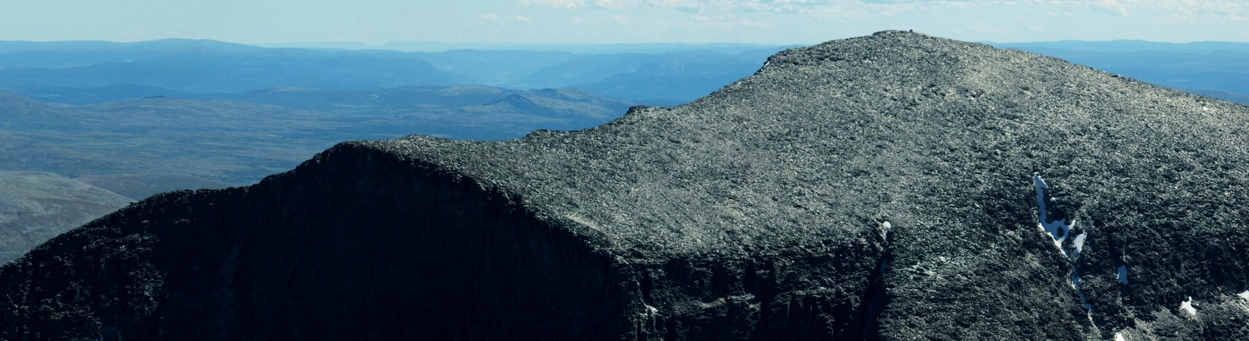 Own work. Summer 2006.